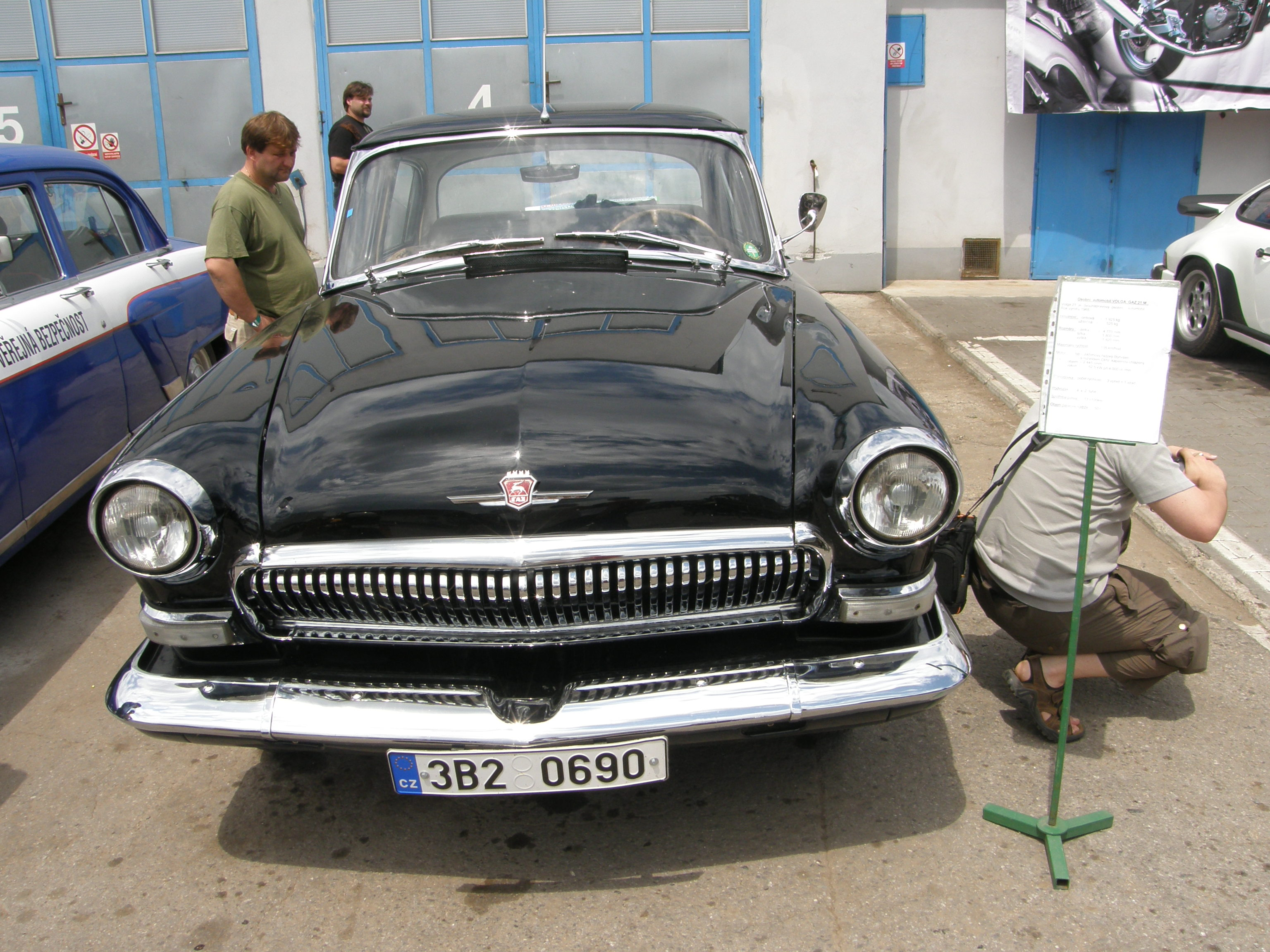 Volga GAZ 21 M